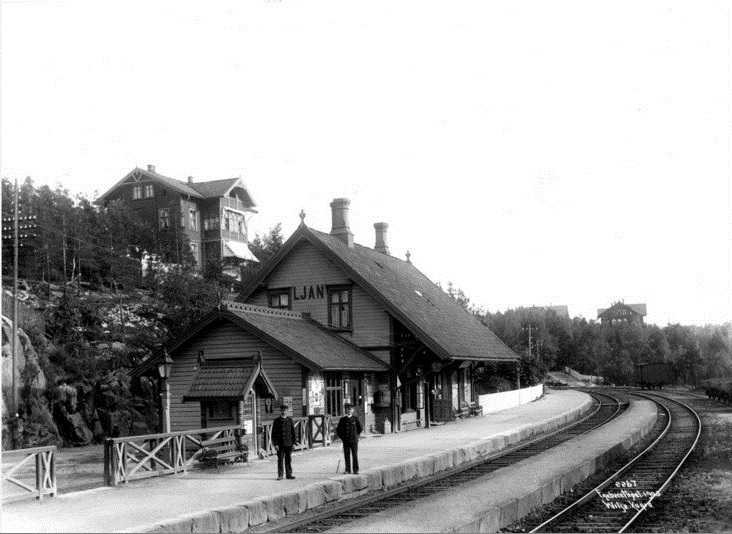 Ljan stasjon 1903, før den ble flyttet i 1920-årene